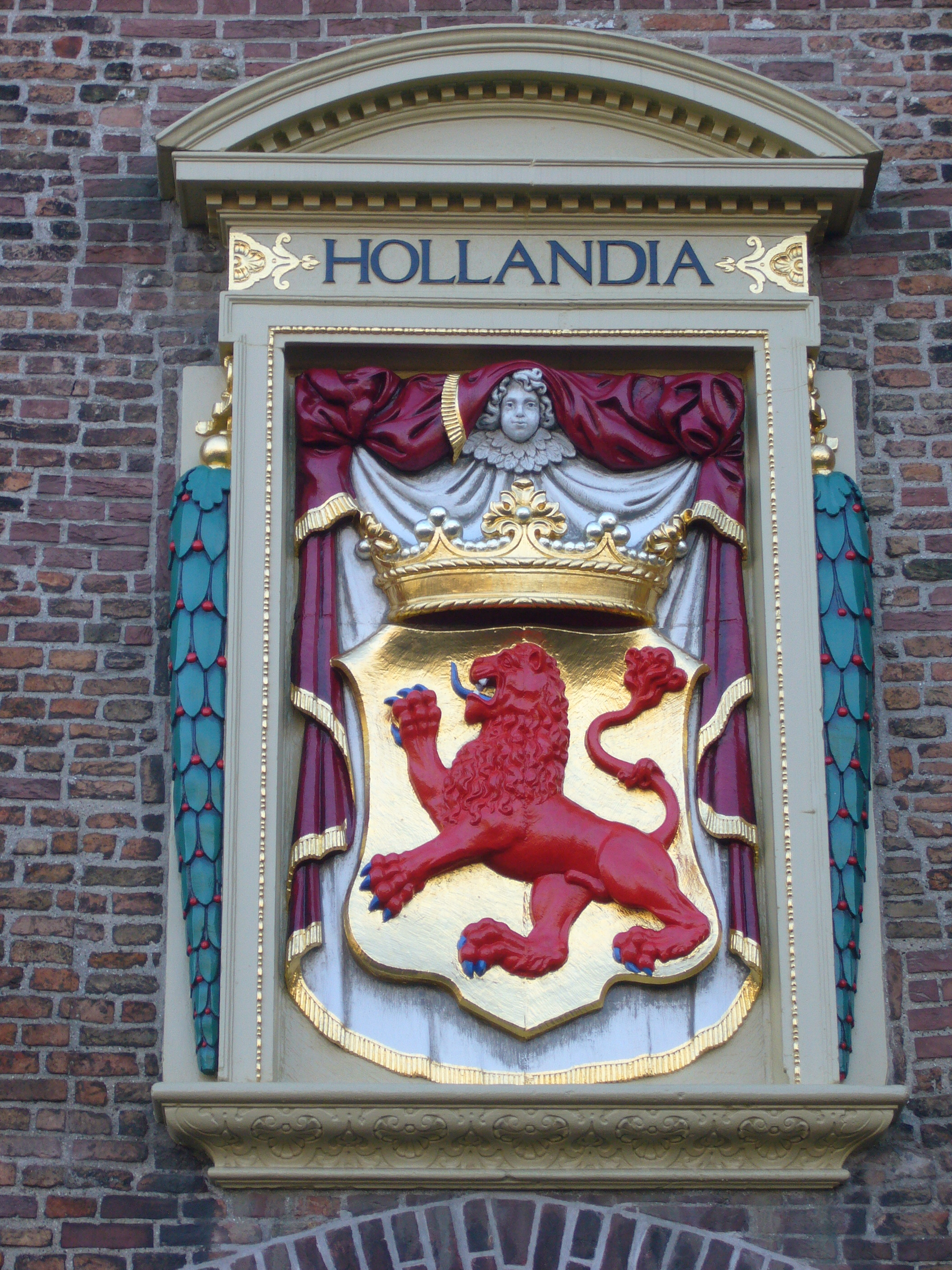 Den Haag, Gevangen poort, wapen van Den Haag (uit 1631) boven de poort aan de kant van de Plaats.